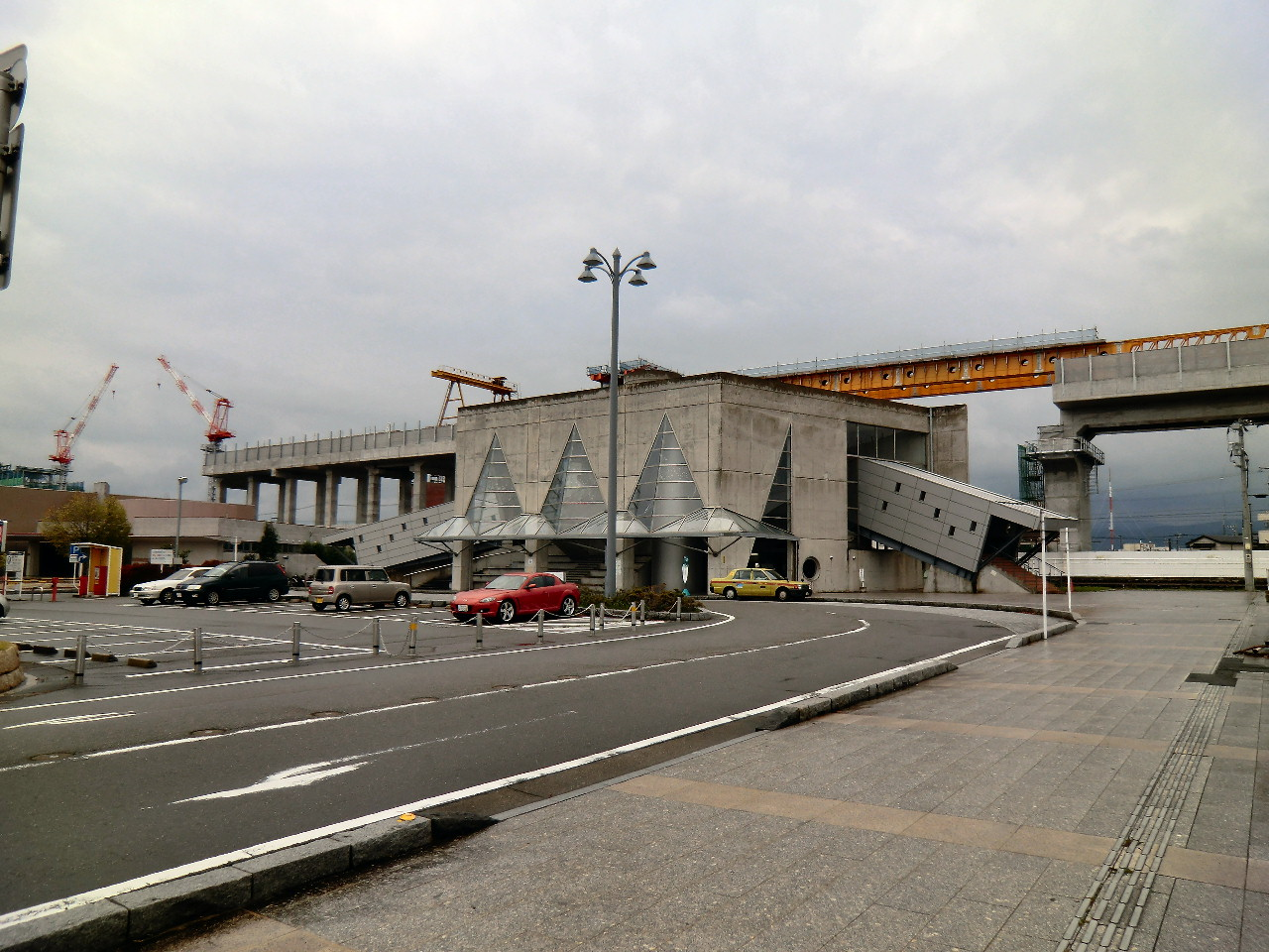 野々市駅 北口